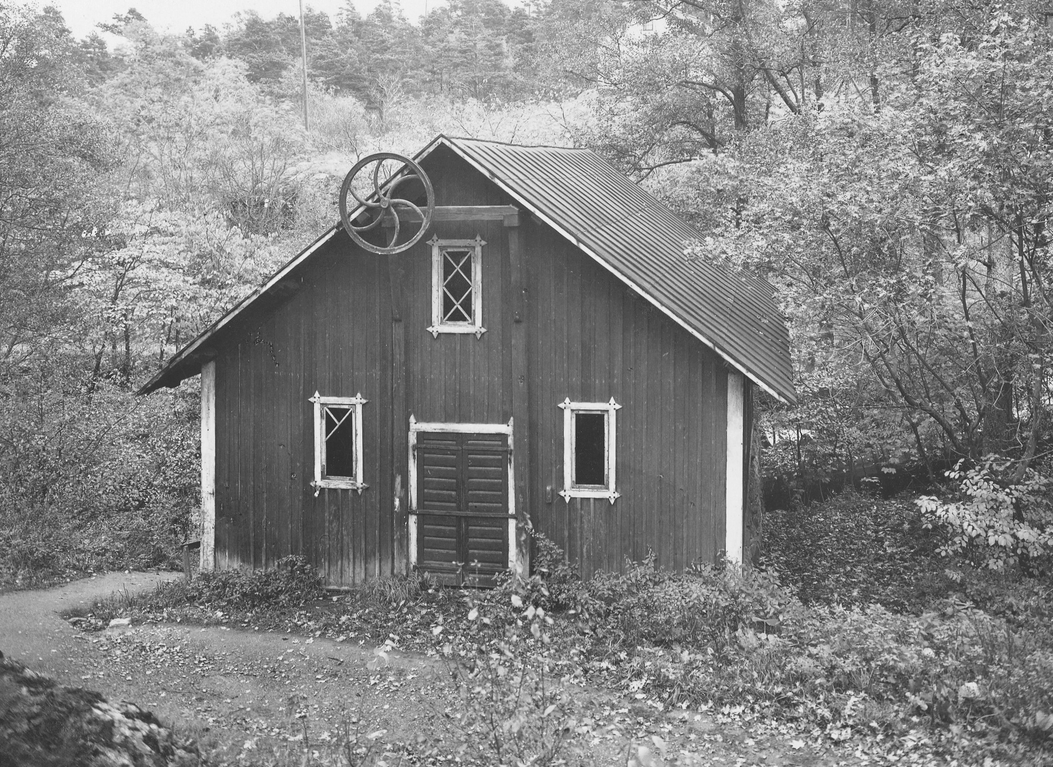 Årsta gård, kvarnbyggnad, 1929